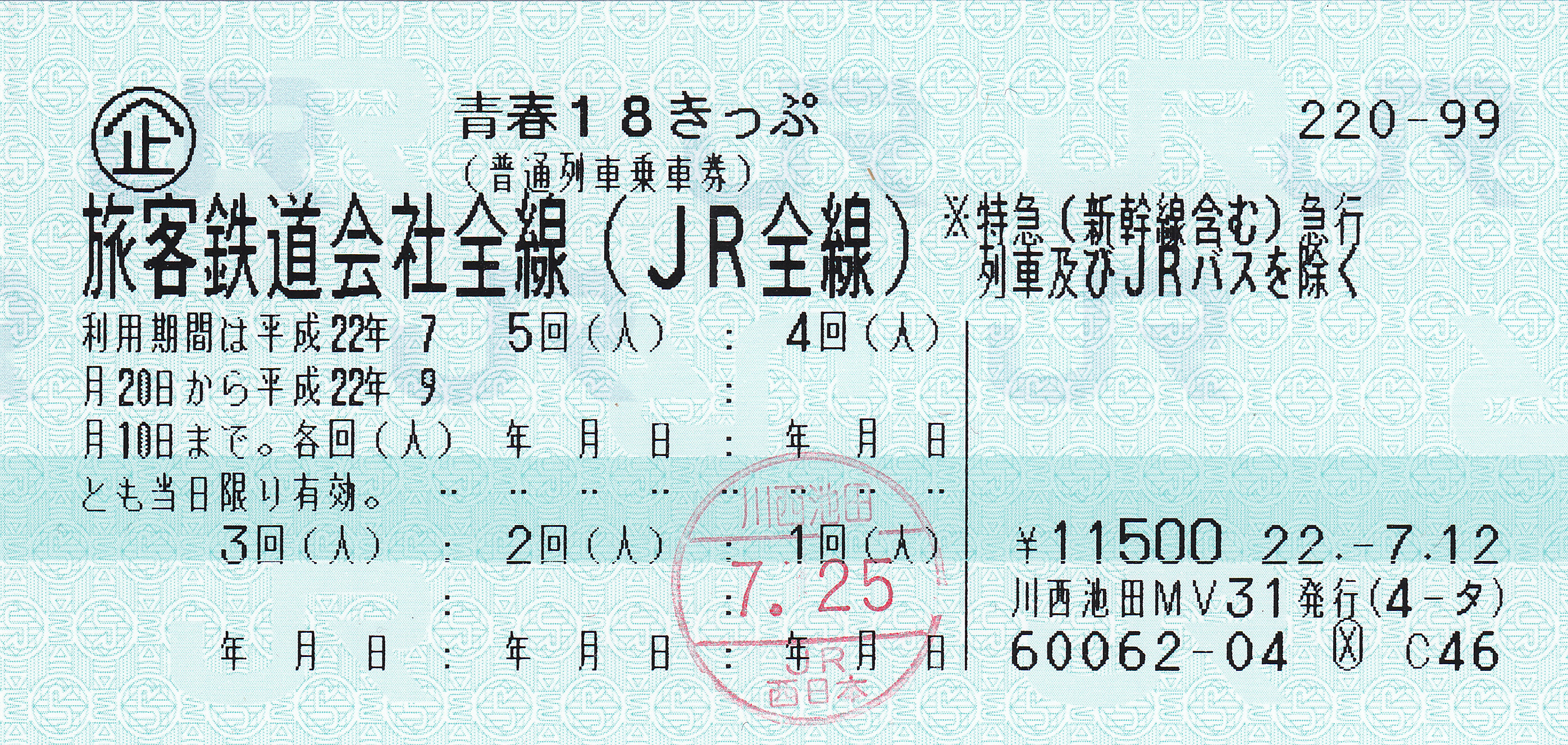 最新の青春18きっぷです。（西）